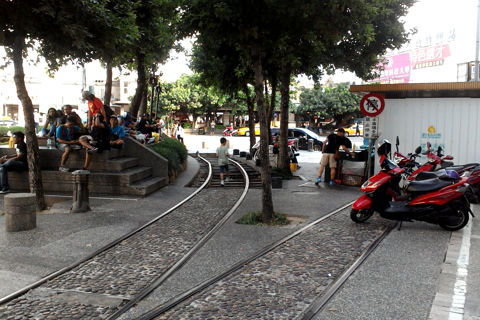 台鐵新竹車站站前廣場懷舊鐵道園區,台灣省新竹市東區東門聯里榮光里